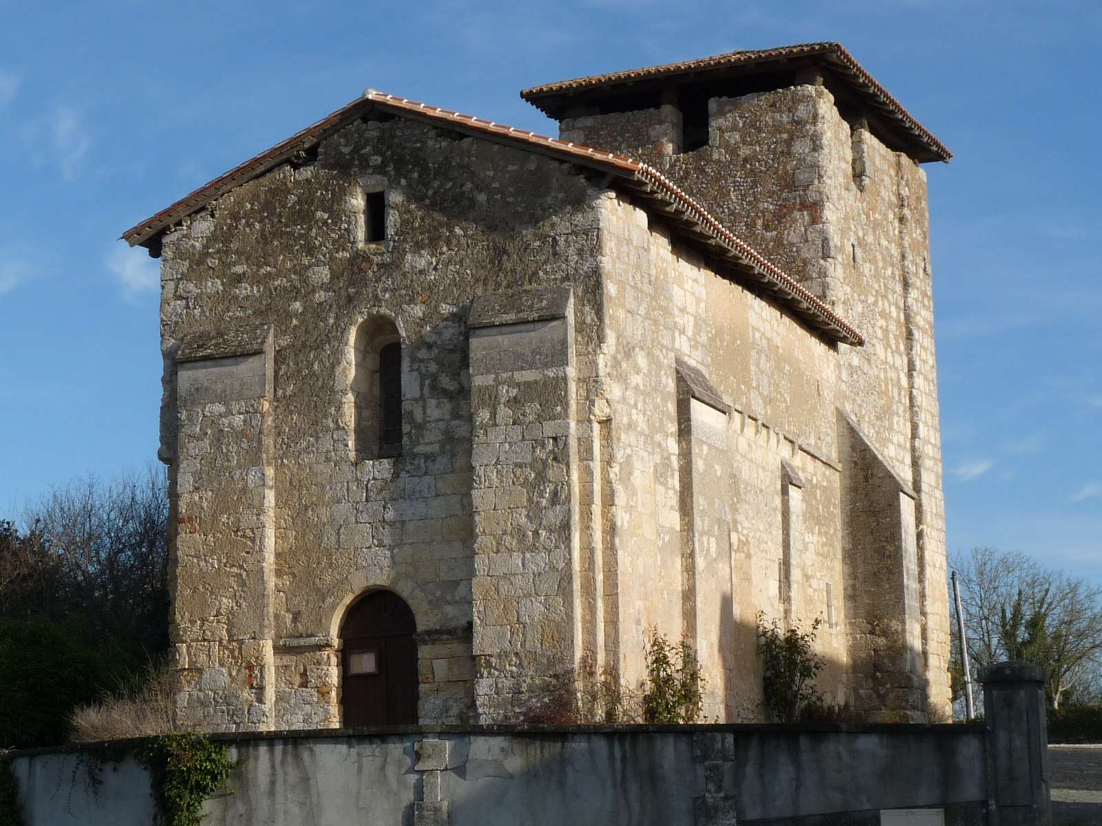 église de Chassaignes, Dordogne, France